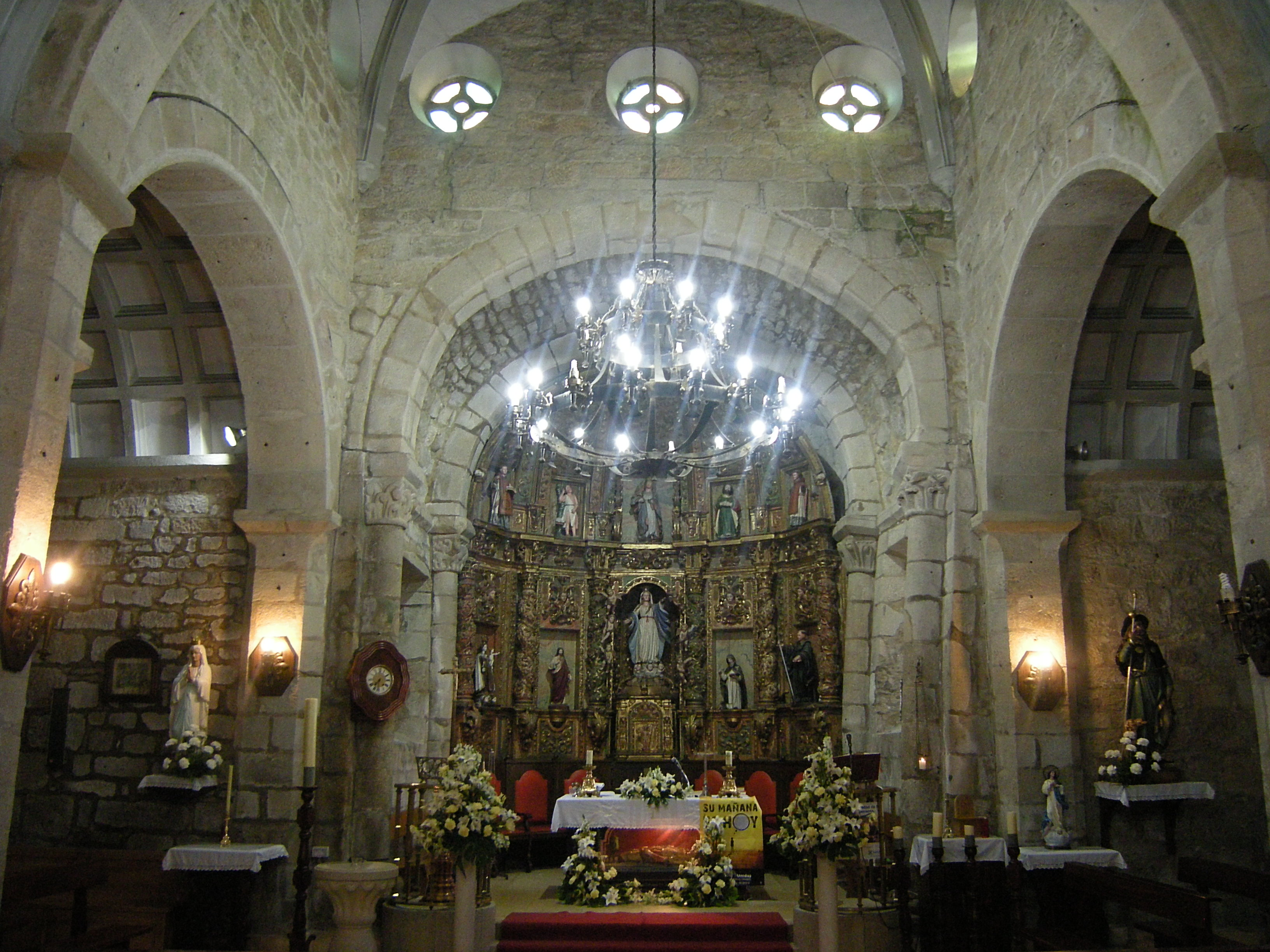 Esta foto participó en el juego En otro lugar de Flickr. Escucha a Aram Ilyich Khachaturian - Vals de Masquerade en Goear.